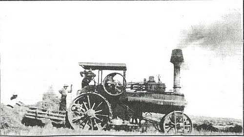 Obreros rurales trabajando en Merlo, provincia de Buenos Aires, 1880.